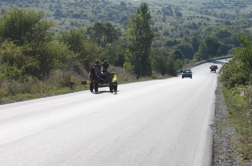 Idyllische bulgarische Fernstraße Nr.1, Europastraße E79, zwischen Vidin und Montana. Kein Schwerlastverkehr, nur Fuhrwerke und gelegentlich ein Lada